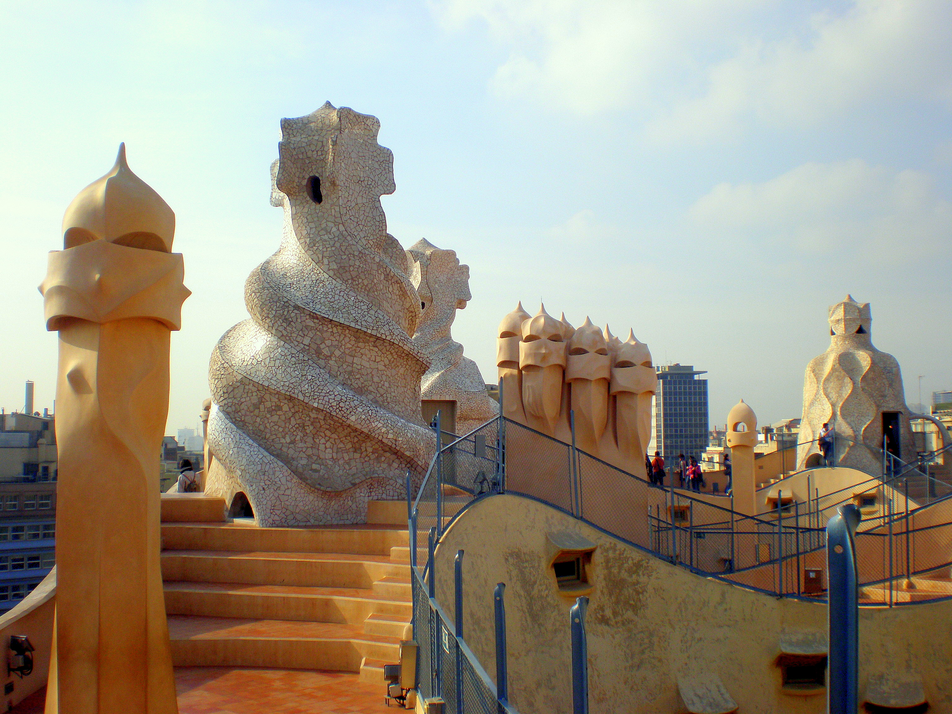 Barcelona - La Pedrera. Terrat